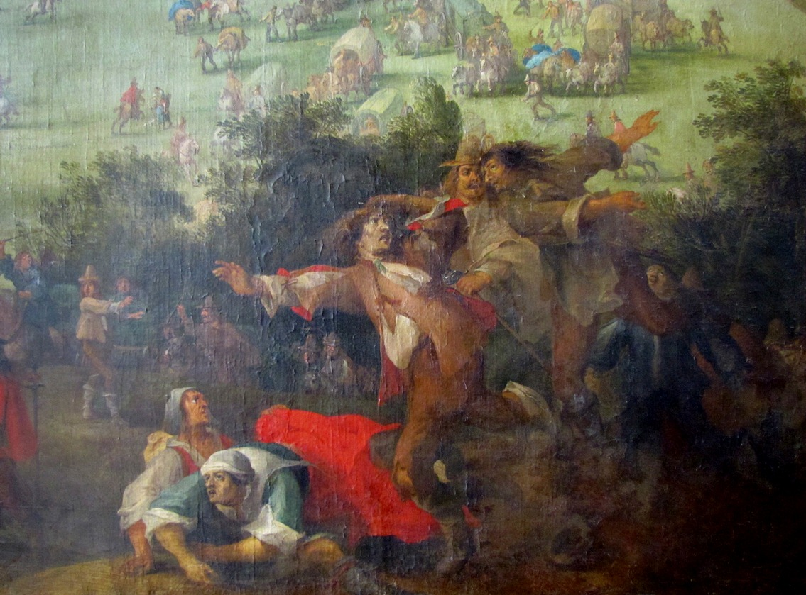 detail